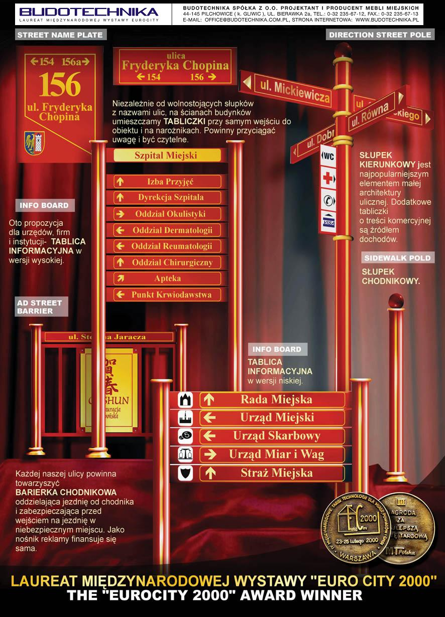 BUDOTECHNIKA-SIM-przykładowy zestaw